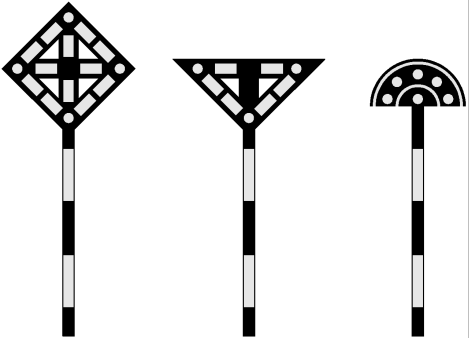 Железнодорожные сигналы «Поднять нож, закрыть крылья», «Опустить нож, открыть крылья», «Подготовиться к поднятию ножа и закрытию крыльев»